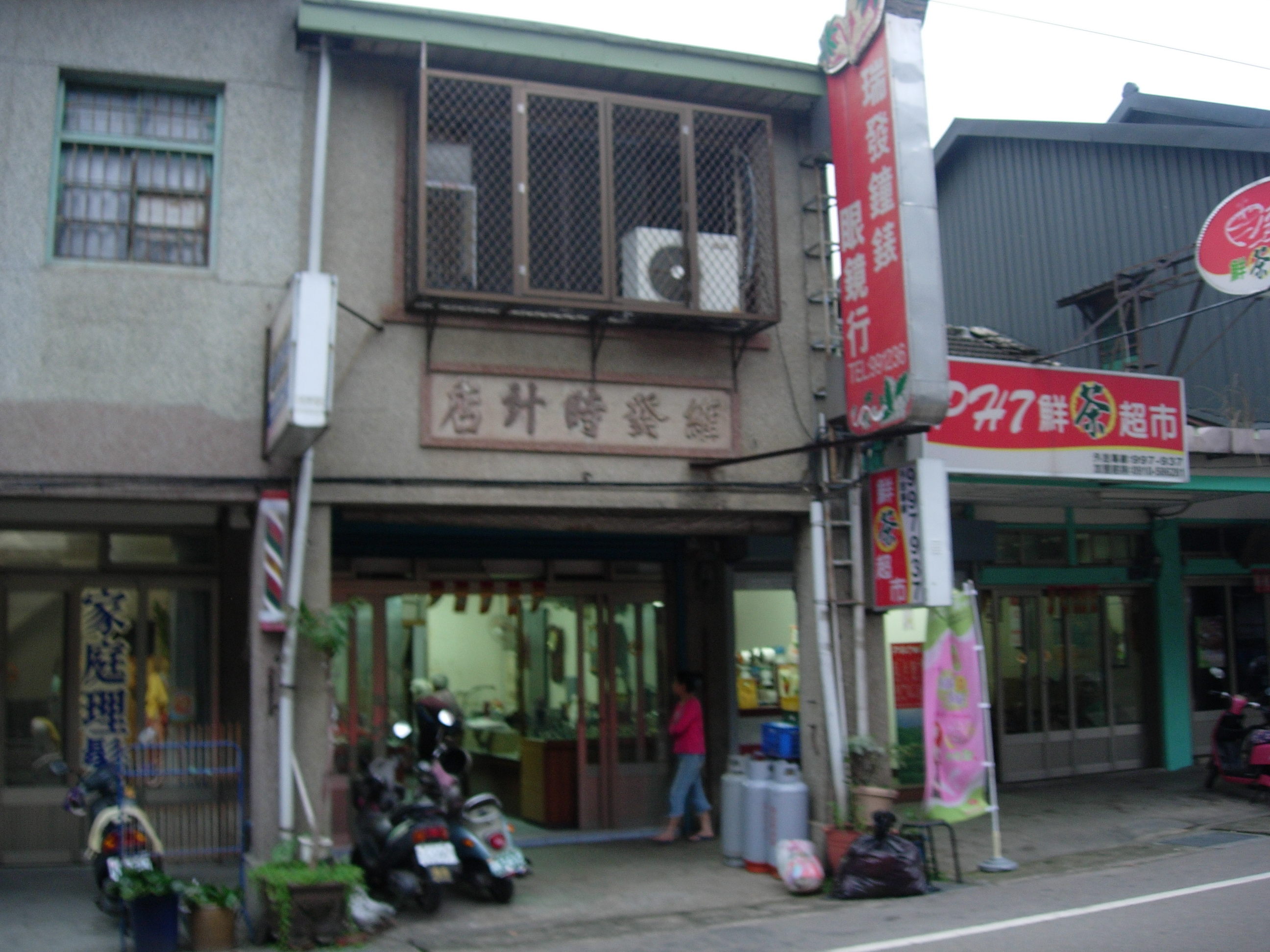 中文（台灣）: 大湖鄉特色街道